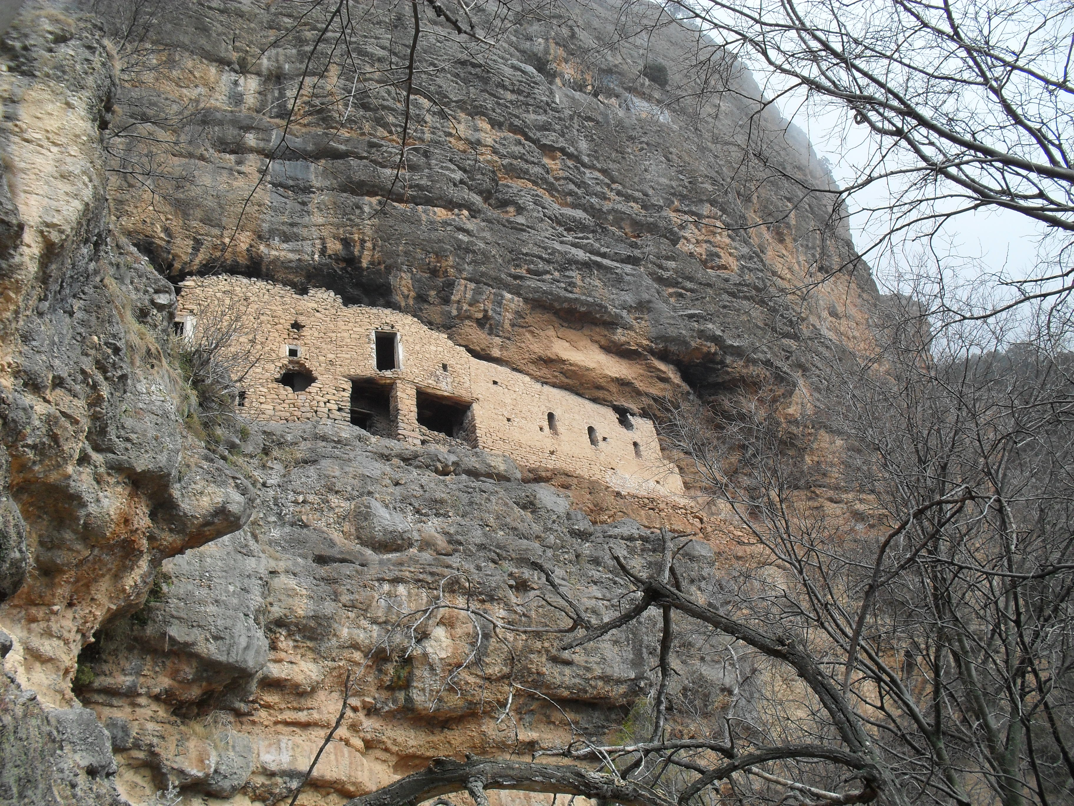 Espluga de Cuberes dins la Reserva nacional de caça del Boumort